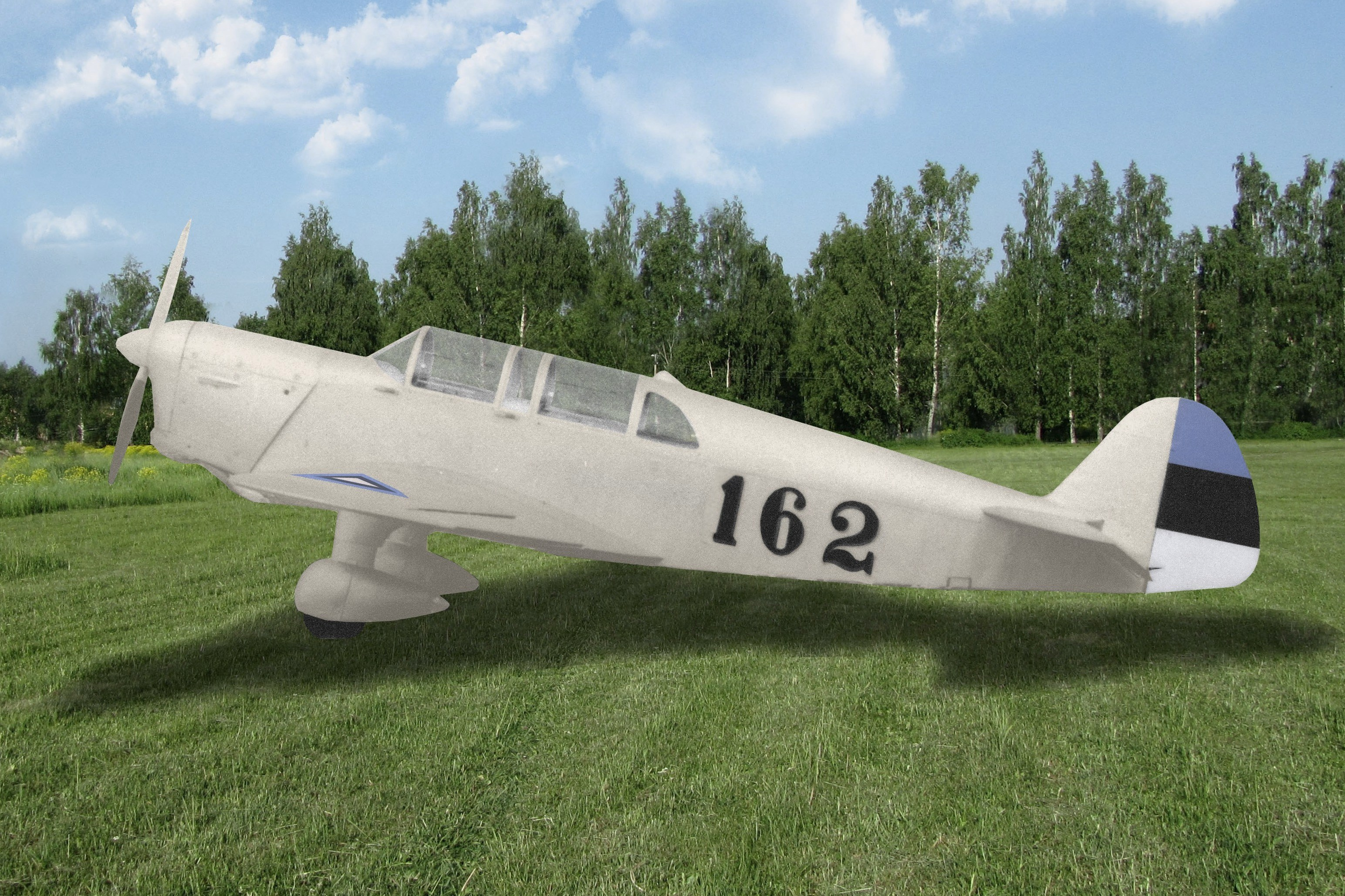 Самолёт РТО-4А на лётном поле